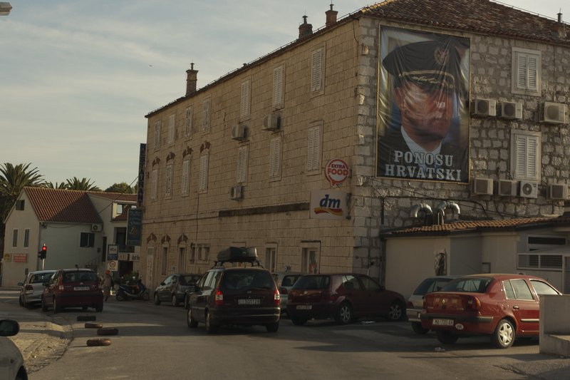 Ponosu Hrvatski - Duma Chorwacji Centrum Makarska, wrzesień 2011 r.